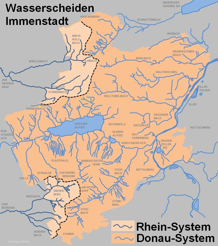 Wasserscheiden im Stadtgebiet - 1. Nordwest: Kirchholzbach, Luibach etc. fließen über Börlasbach zur Unteren Argen und in den Bodensee - 2. Südwest: Weissach fließt über Bregenzer Ach zum Bodensee - Alle andern Gewässer in Immenstadt fließen zur Iller. (erstellt mit MS-Excel)